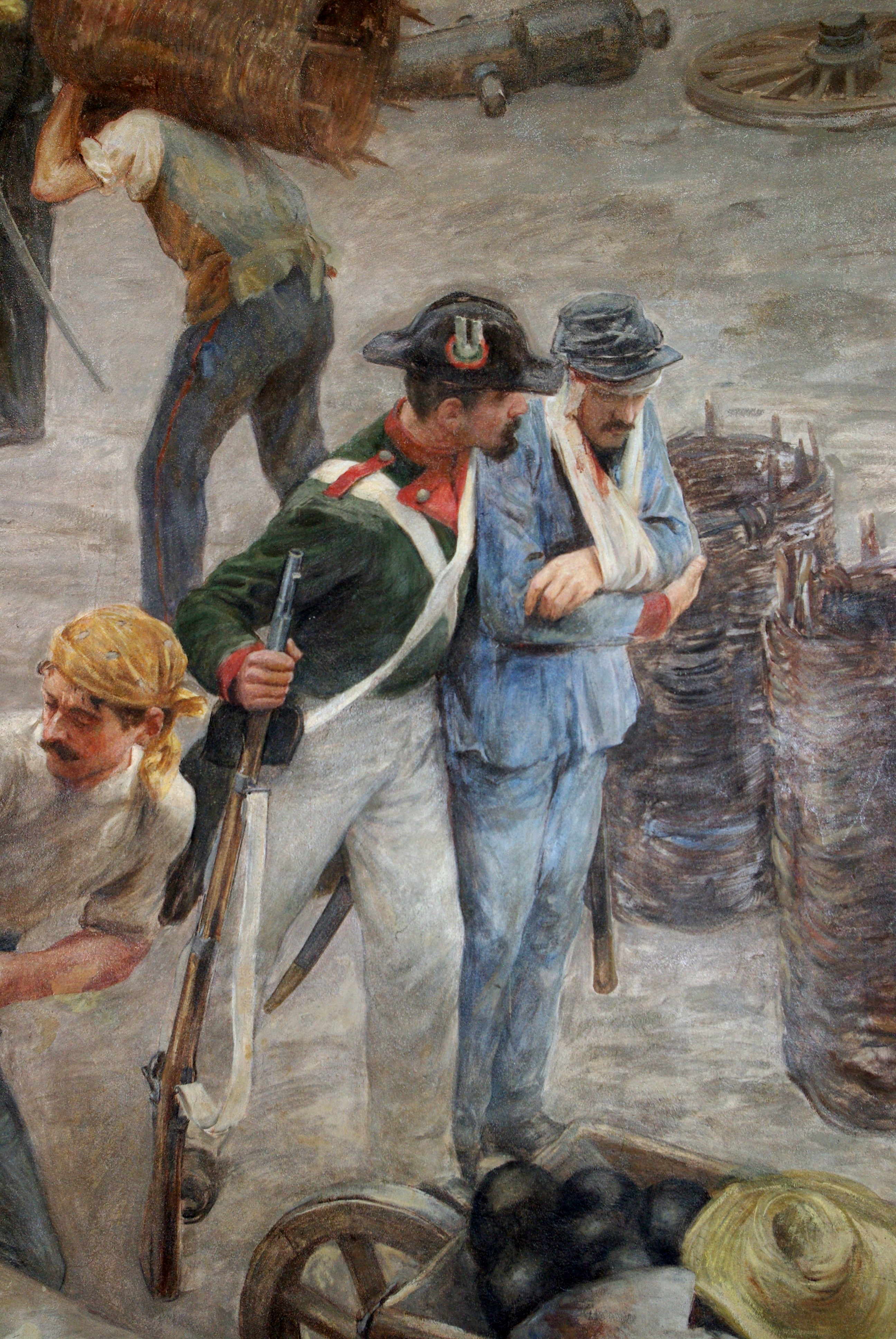 Ausschnitt eines Freskos im Turm von San Martino della Battaglia mit einer Szene der Schlacht von San Martino